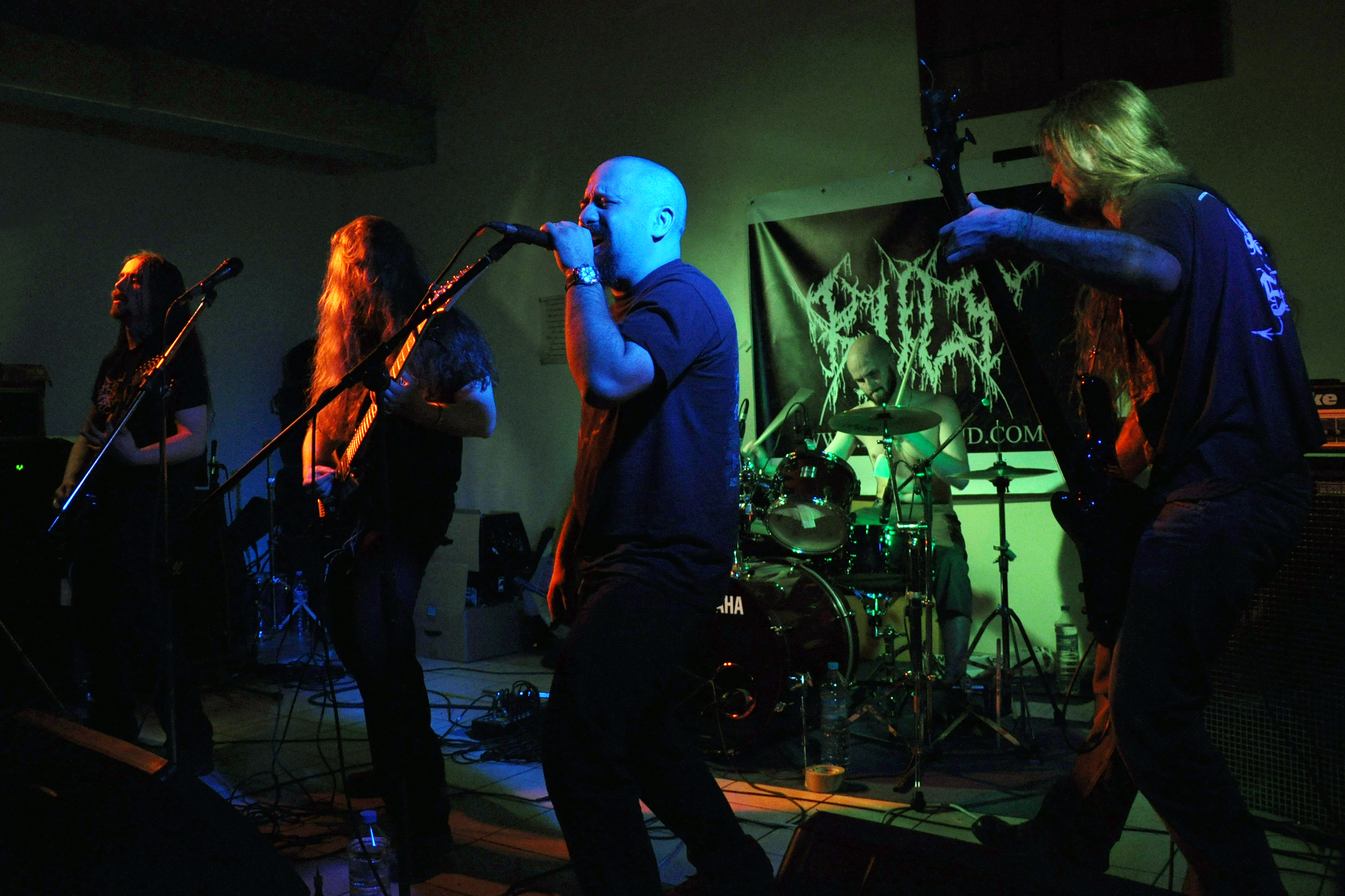 Heol Telwen au Sequanian Fest (14/03/09), organisé par la Horde Sequane à Blamont. Heol Telwen est un groupe de Folk Metal originaire de Paris.